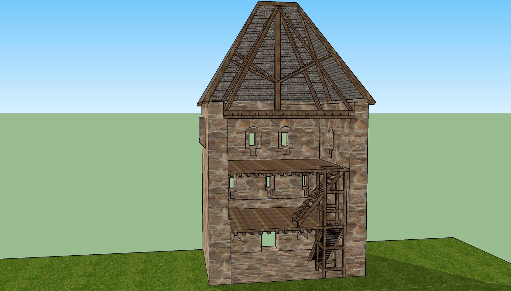 Poskus rekonstrukcije stolpastega dvora Kebelj. Osnova delana po skicni osnovi dr. Avguština Stegenška.